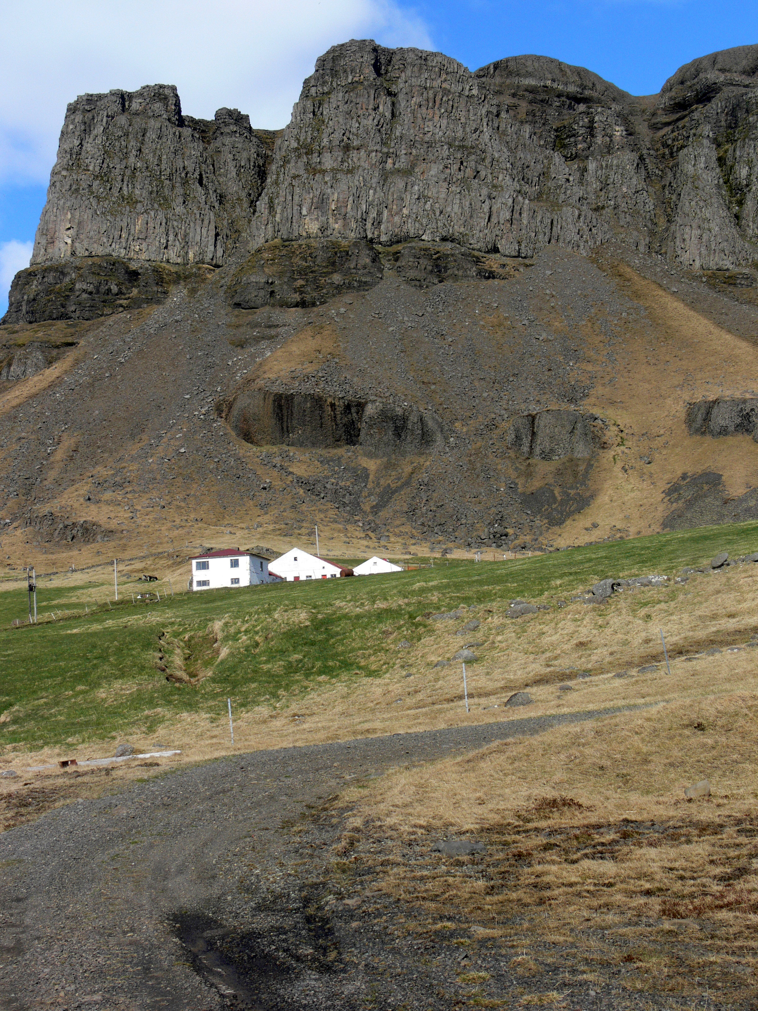 Hof Þyrill unter dem Berg Þyrill. Hier wohnte in alten Zeiten Þorsteinn Gullhnappur, der den Banditen Hörður Grímkelsson auf der Geirshólmur-Insel tötete (Harðar saga og Hólmverja)